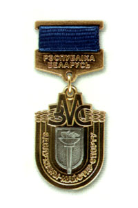 Знак к почётному званию «Заслуженный мастер спорта Республики Беларусь» (вариант 2005 года)